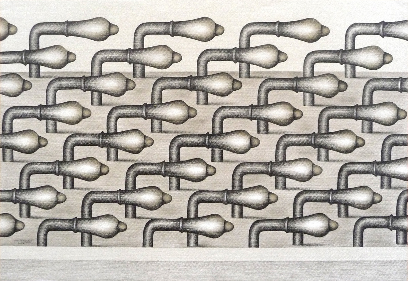 Hermann Waldenburg, Noch nicht reif, 1974, Graphitstift, Farbpulver und Kreide auf Ingres-Papier, 32,7 x 47,3 cm